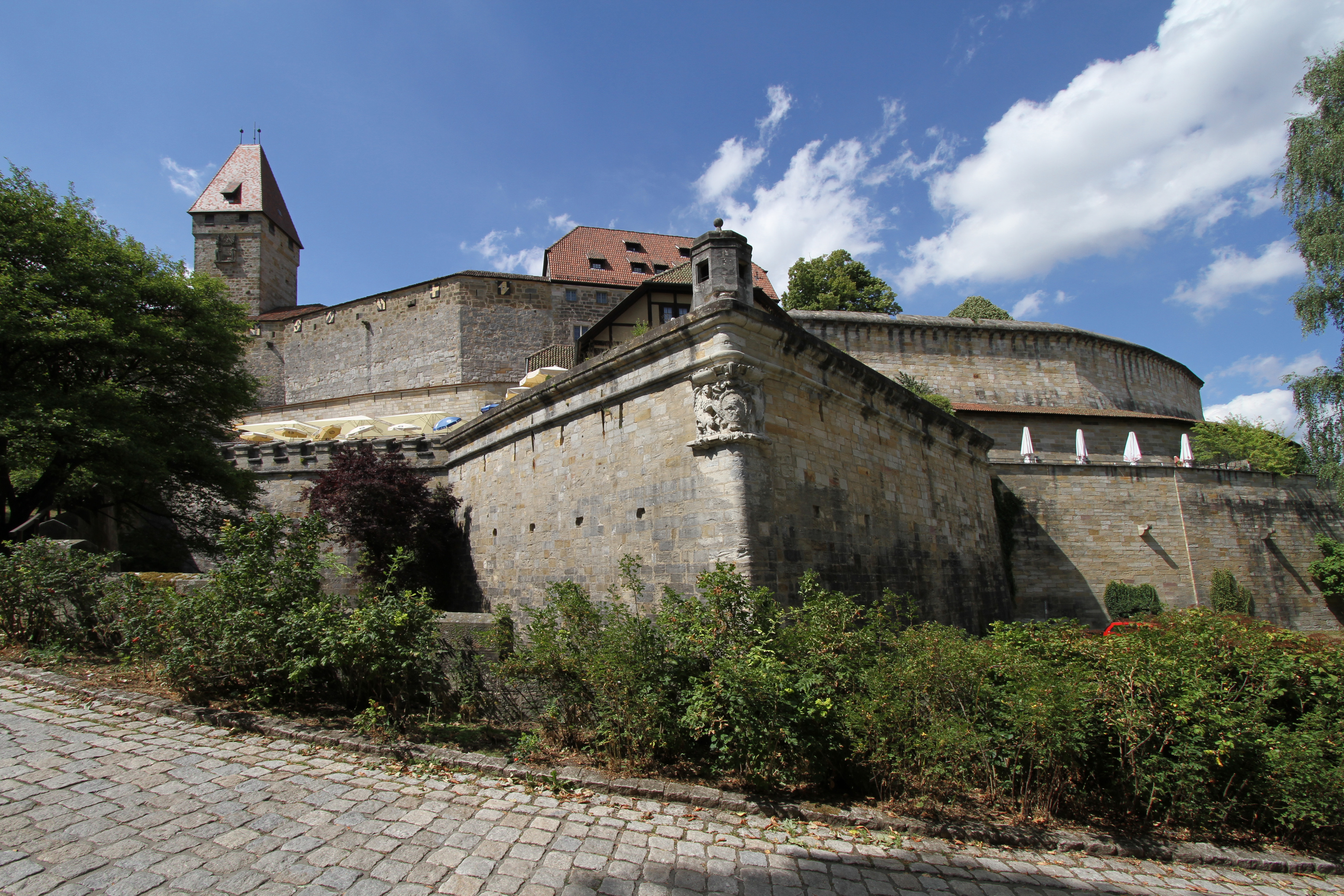 Veste Coburg